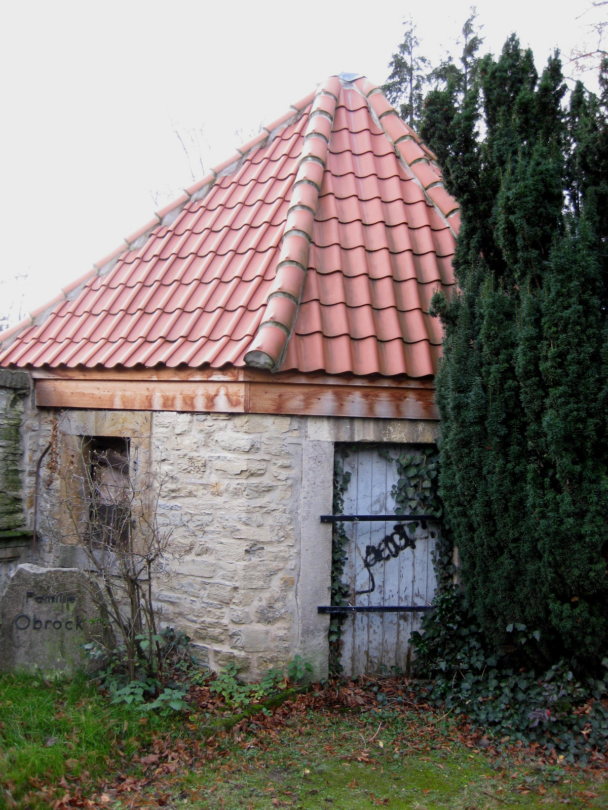 Totengräberhäuschen von 1808 auf dem Johannisfriedhof in Osnabrück